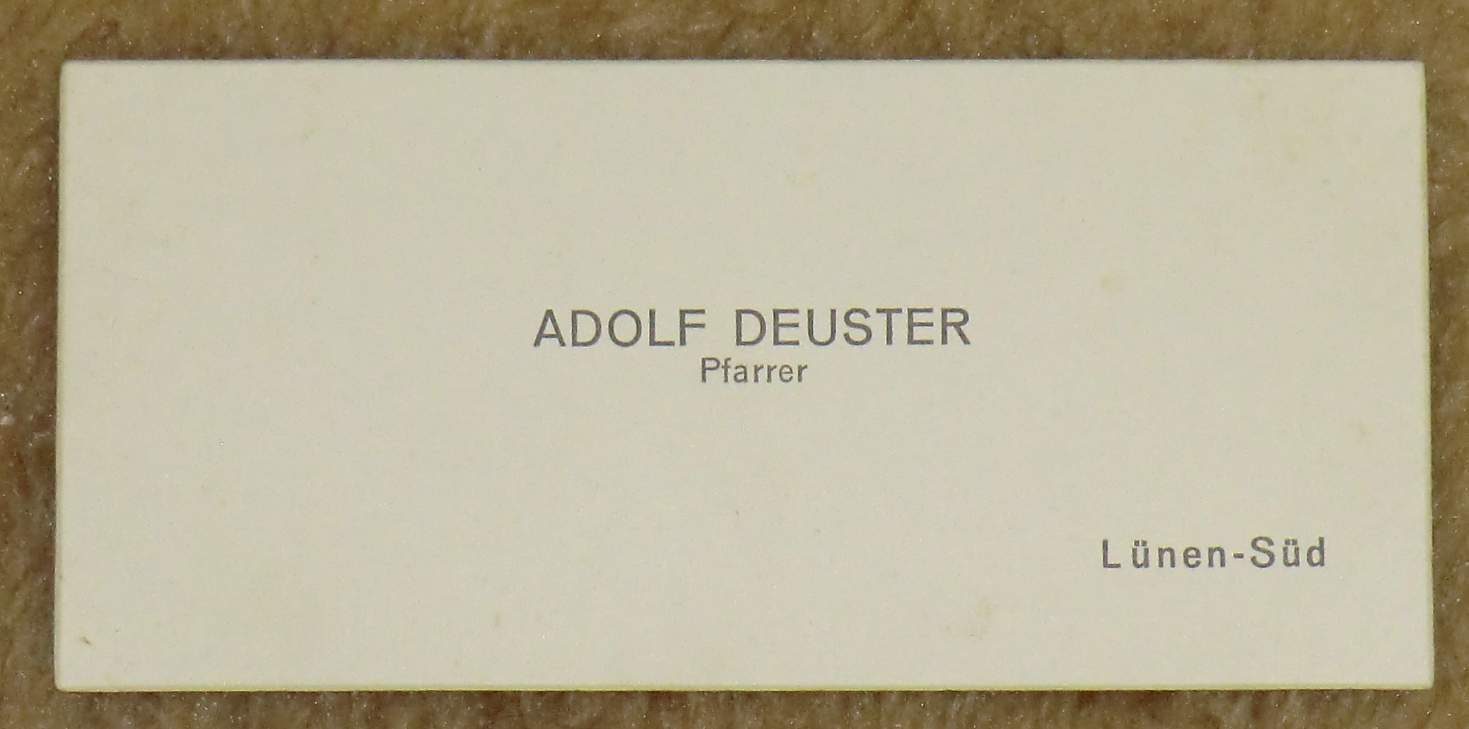 Visitenkarte Adolf Deuster um 1940